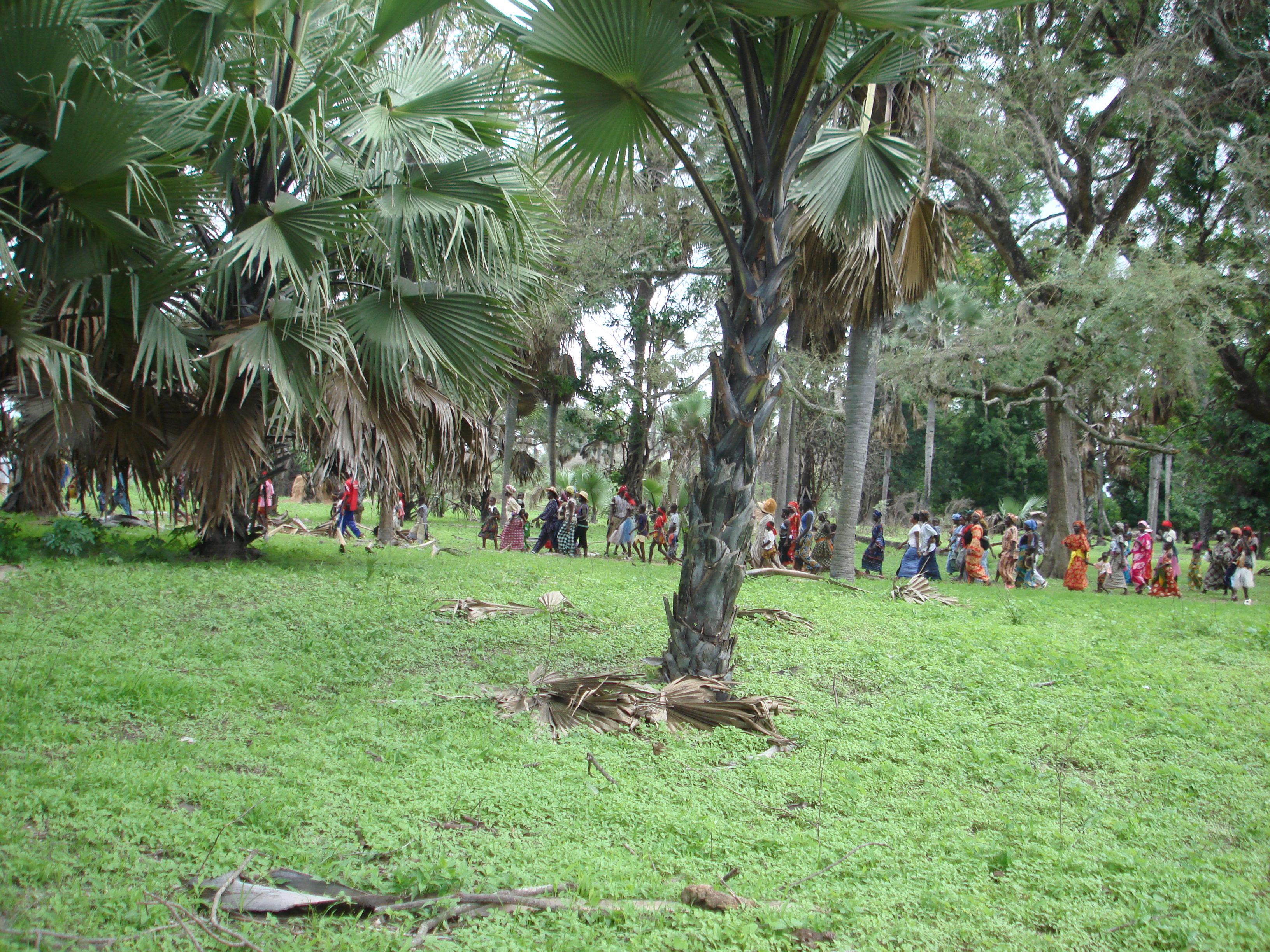 Rassemblement des villageois diolas lors du boukout de Baïla (Casamance, Sénégal)